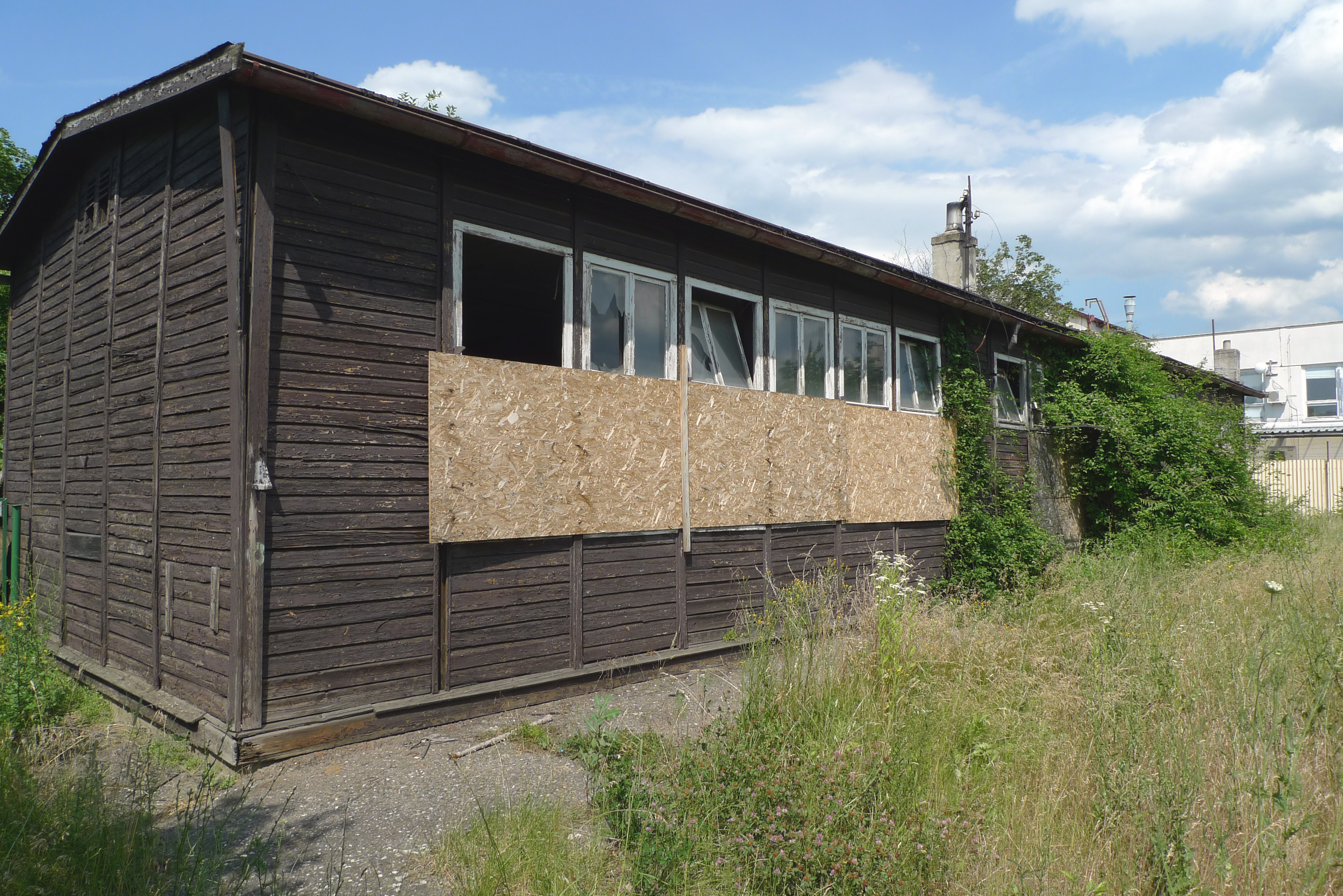 Obecná škola na Bohdalci v Praze 10 ve stavu z léta 2013.